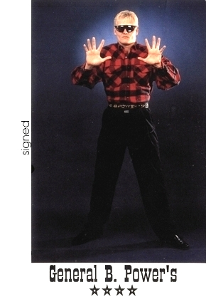 Original - Autogrammkarte